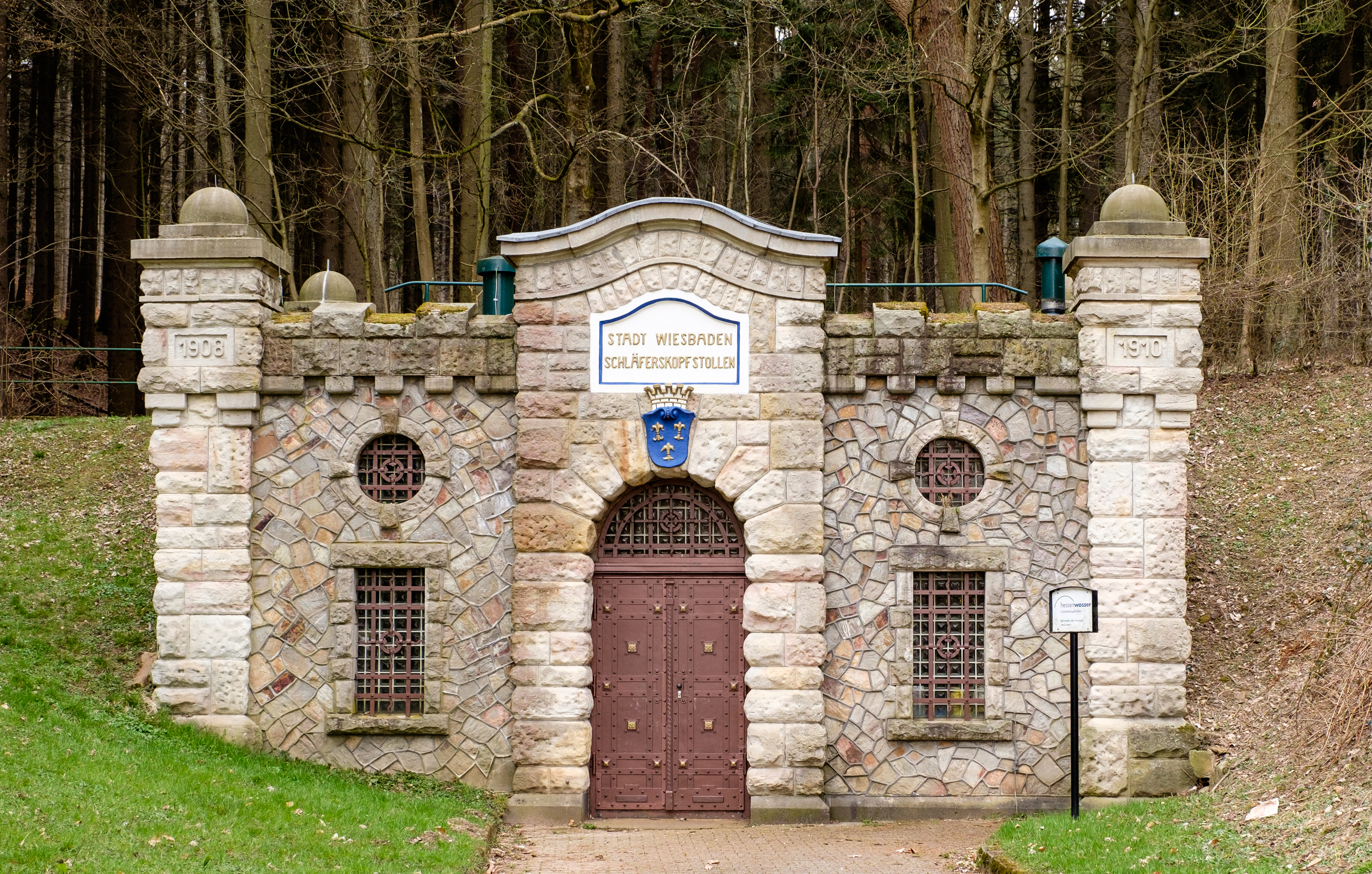 Portal des Schläferskopfstollens in Wiesbaden-Klarenthal